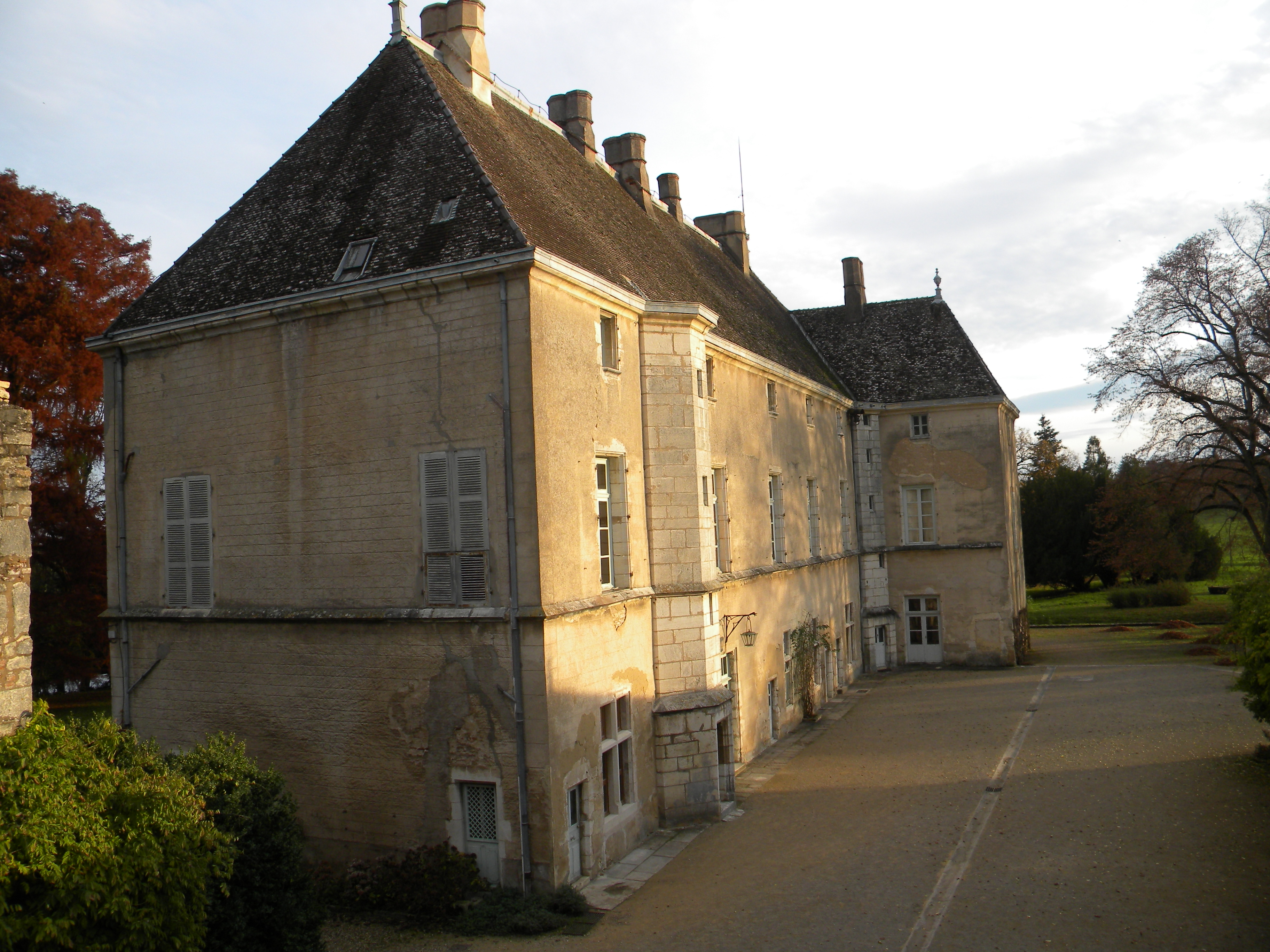 Kastelo de Germolles